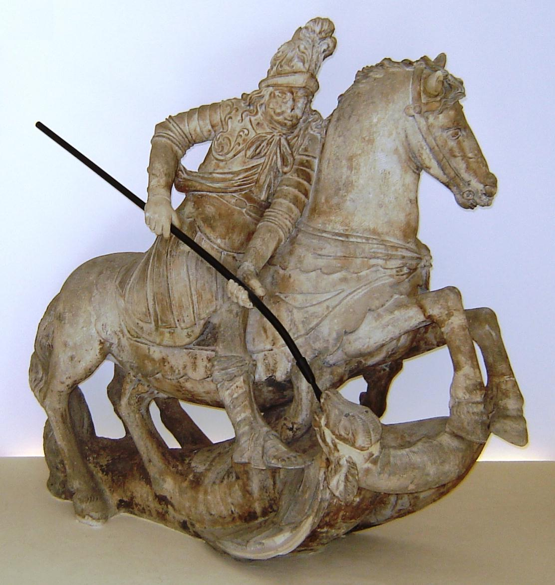 Magdeburg, Alter Markt 7, Skulptur (Kulturdenkmal)